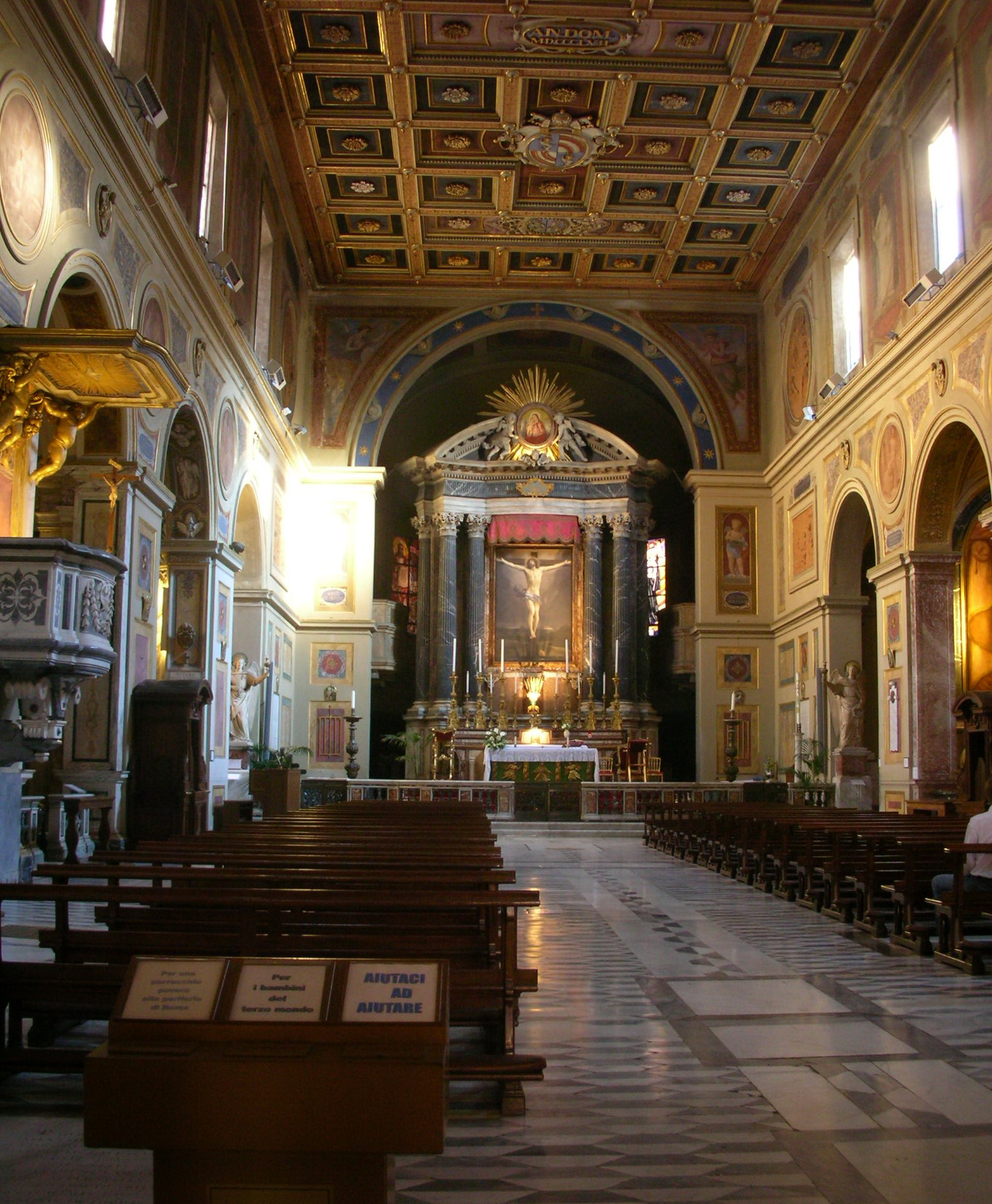 Interior, San Lorenzo in Lucina, Rome